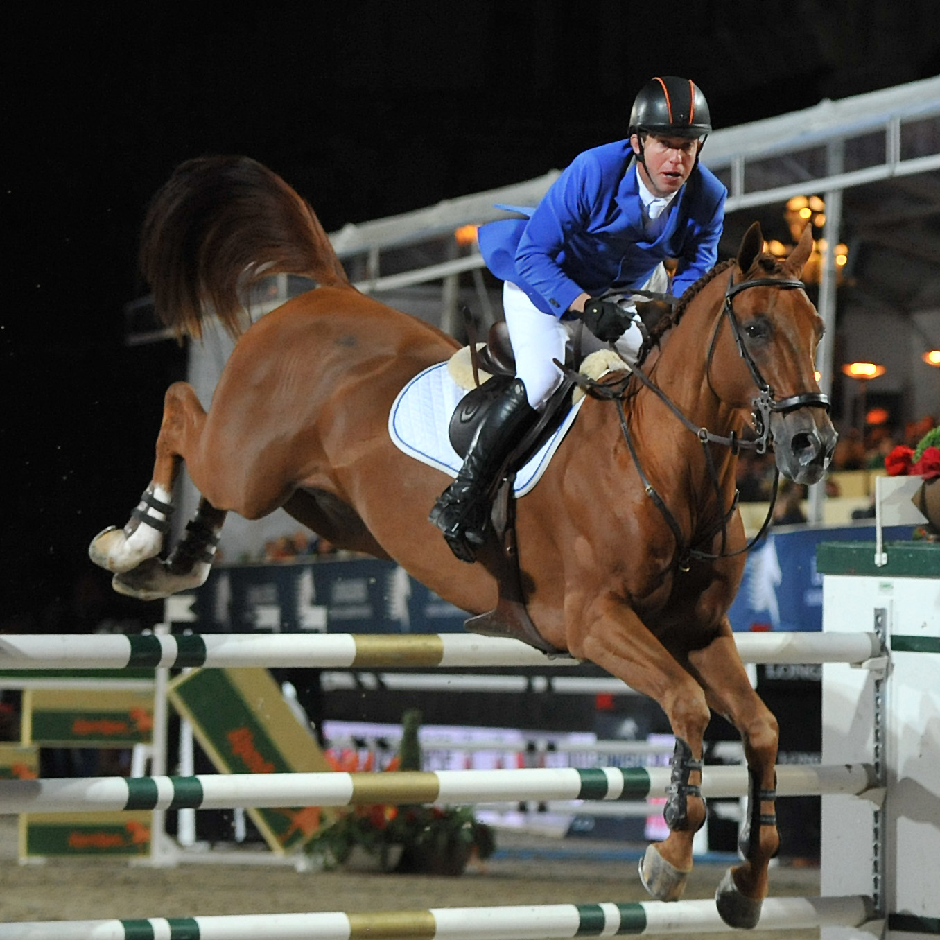 Vienna Masters am 21. September 2013 Longines Global Champions Tour Gerco Schröder (NED) auf London